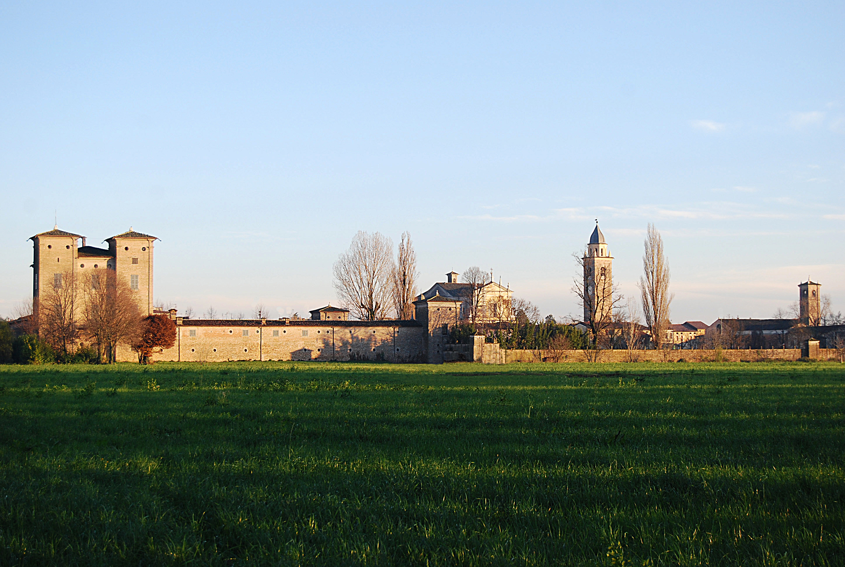 Calvisano, panorama.